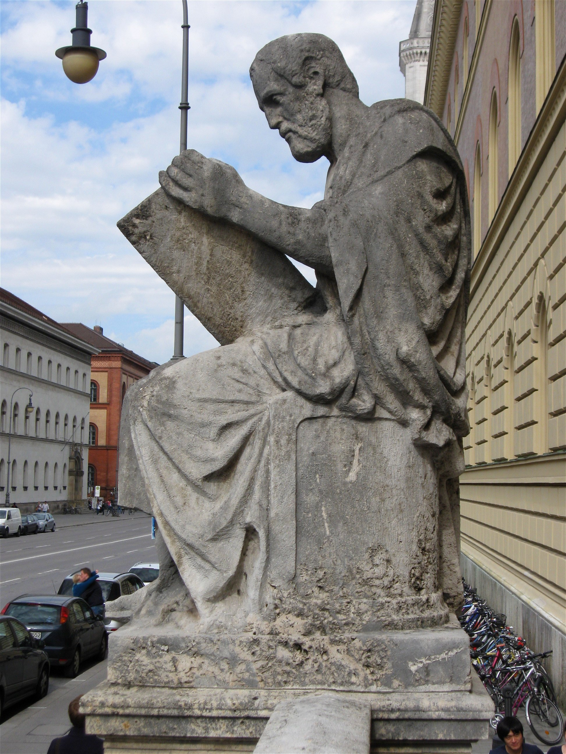 München, Ludwigstraße 16; Bayerische Staatsbibliothek, 1832–39 von Friedrich von Gärtner; Thukydides-Denkmal vor dem Eingangsportal, Kopie von Hans Vogel (nach dem 2.Weltkrieg); Das Original von Ernst Mayer (Entwurf: Ludwig Michael Schwanthaler) befindet sich seit 1964 auf dem Schulpark der Grundschule in Bernau am Chiemsee (Denkmal D-1-87-118-44).